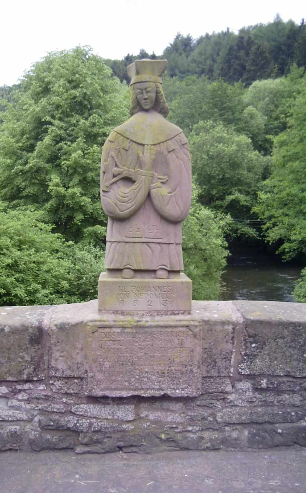 Bildbeschreibung: Johannes von Nepomuk - Brückenheiliger, Sandsteinfigur, 1823, Seffern Quelle: eigenes Foto Fotograf/Zeichner: bodoklecksel 14:35, 26. Jun 2006 (CEST) Datum: Juni 2006. Sonstiges: ...